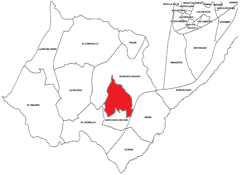 Localización de Los Alisios en el distrito Suroeste